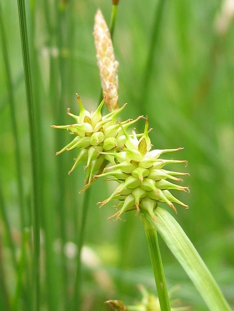 Carex flava